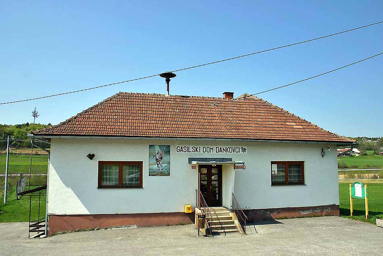 Prostovoljno gasilsko društvo Dankovci. Volunteer fire Dankovci. Freiwillige Feuerwehr Dankovci.